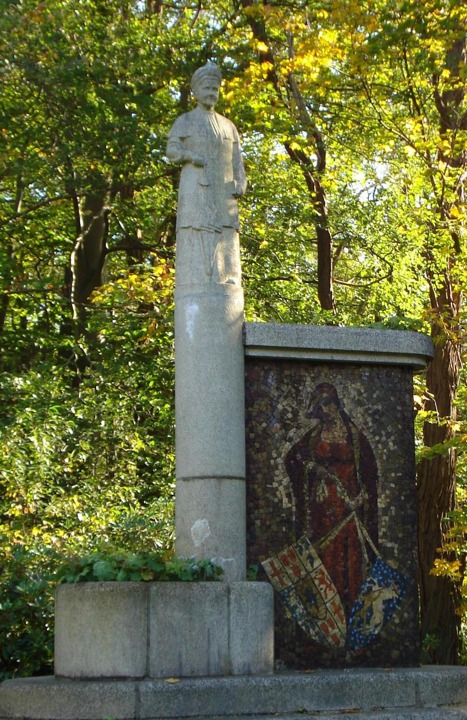 Baarn, Gerrit van der Veenlaan. Monument Koningin Emma van Gerrit van der Veen. Baarn/The Netherlands. FOP.